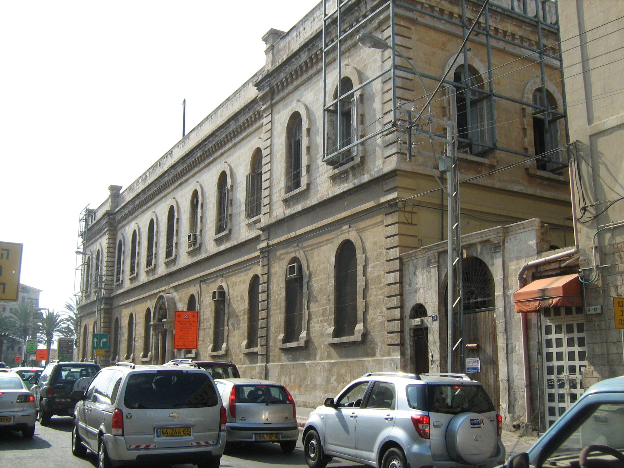 בית החולים הצרפתי ברח' יפת